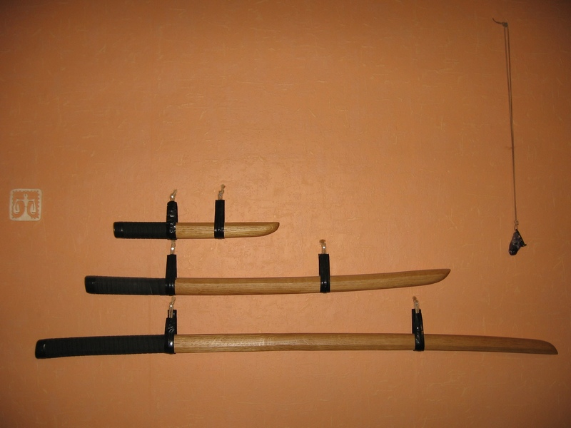 Bokkeny na ś›cianie